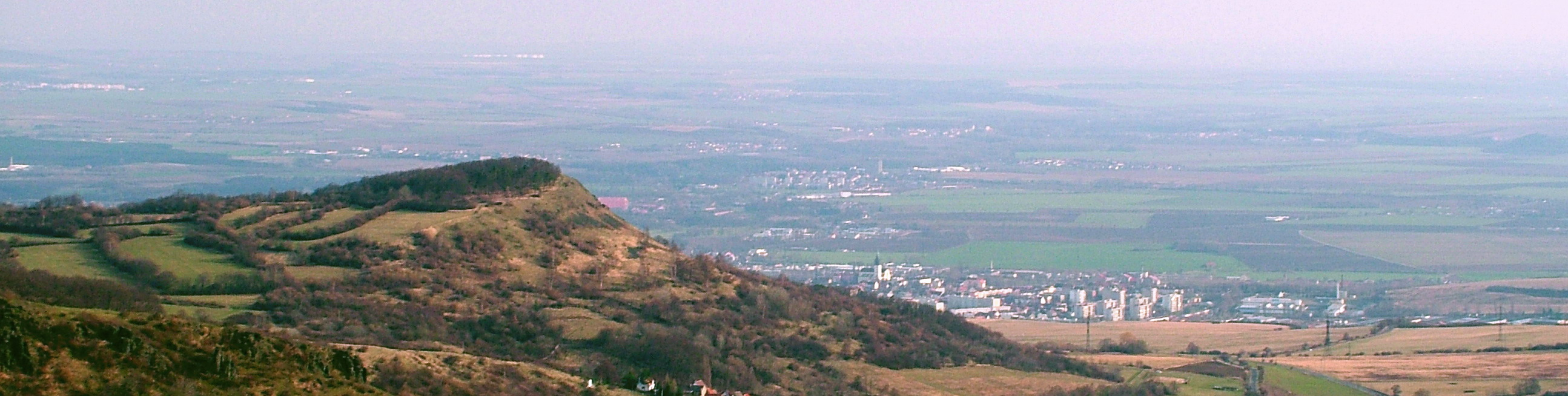 Pohled na Litoměřice a okolí z Varhoště. Foto: Cafa